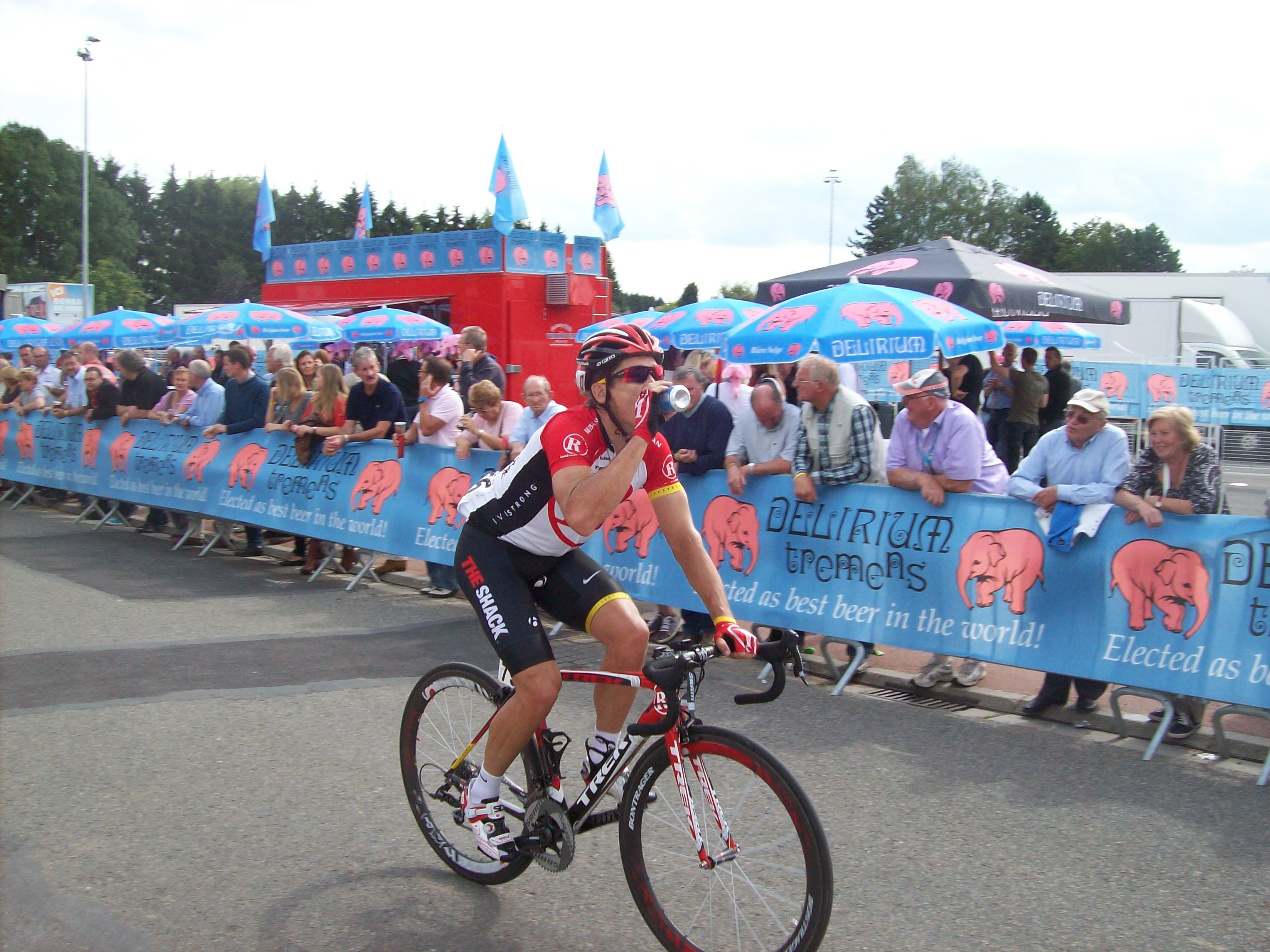 Robbie McEwen (Team RadioShack) lors de la 3e étape du Tour de Wallonie 2011 à Perwez, province du Brabant wallon, Belgique.